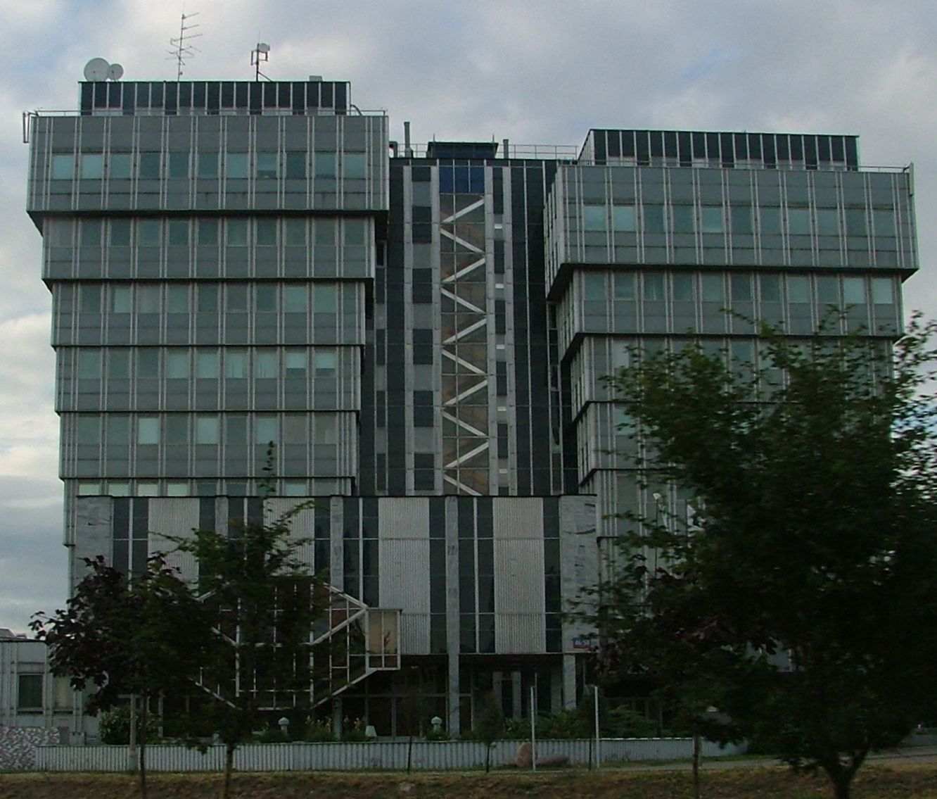 PL, Warsaw, Poland, Żoliborz, Ciech SA, ul. Powązkowska 46/50, 01-728 Warszawa